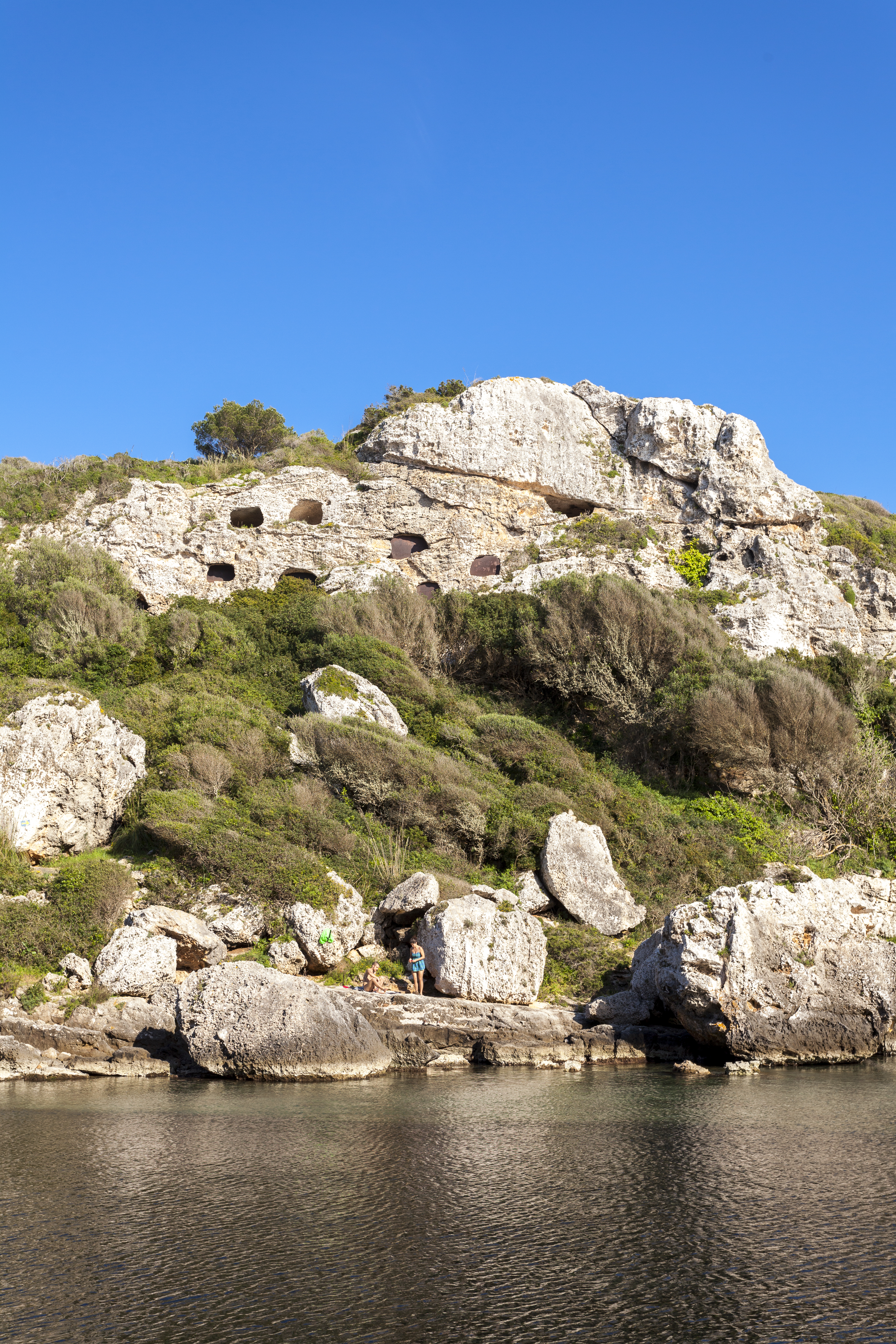 Conjunt d'hipogeus de la necròpolis als penyals de Cales Coves